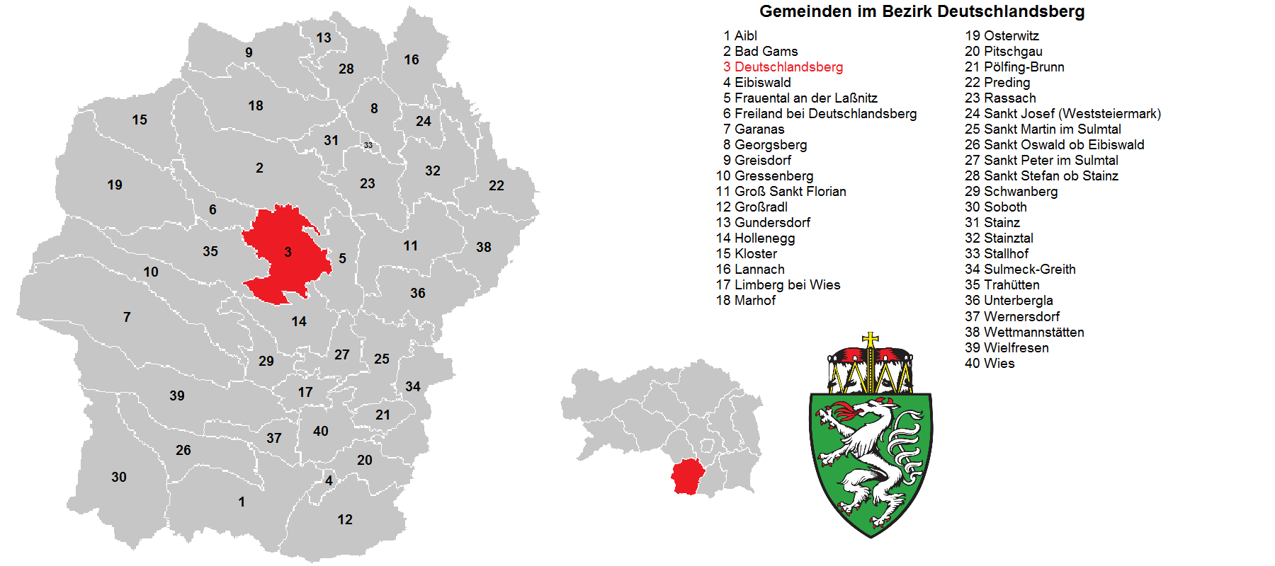 Bezirk Deutschlandsberg